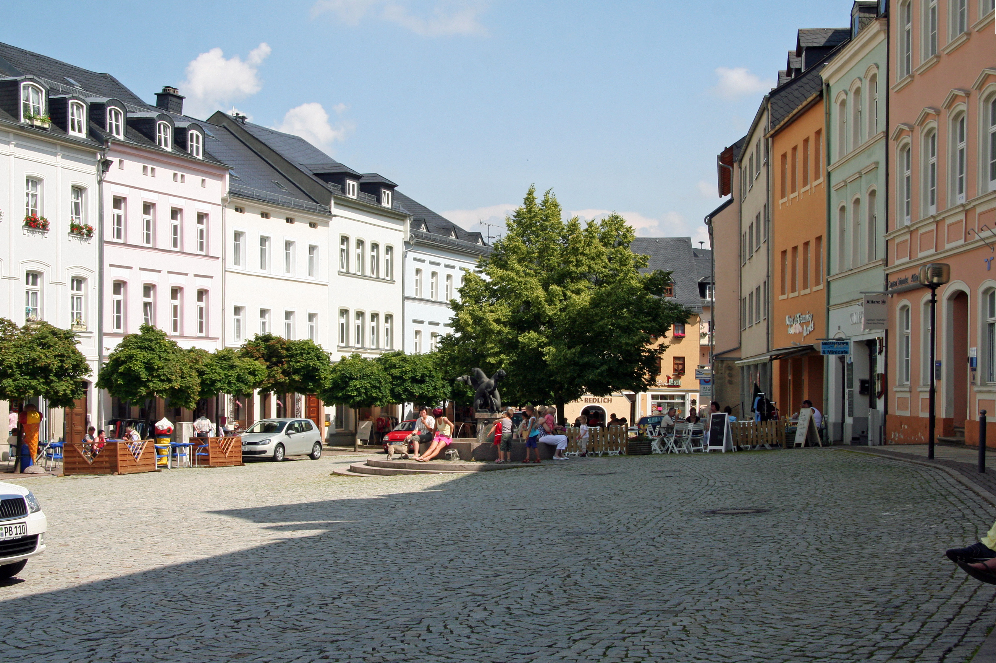 Südlicher Teil des Marktes in Bad Lobenstein.